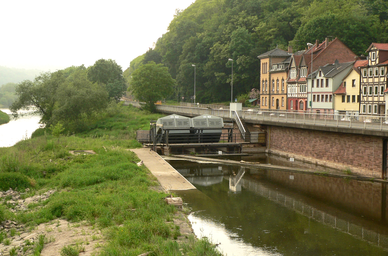 Früherer Standort der Blümer Mühle, von der Werrabrücke gesehen